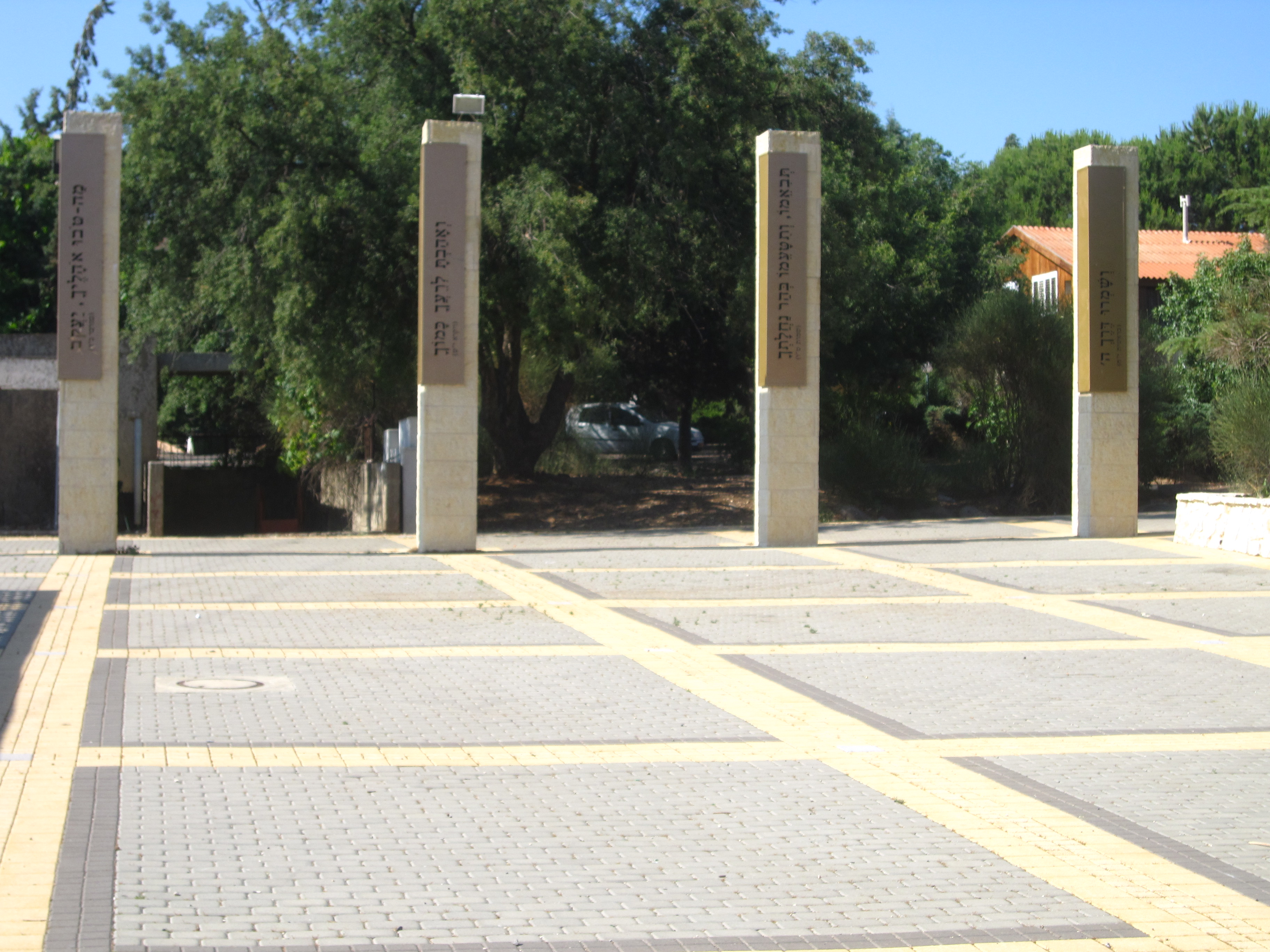 ה"כיכר המרכזית" ביישוב קשת